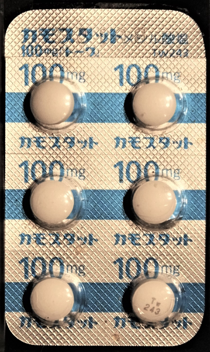 Camostat,INN; 開発コード FOY-305 カモスタット 医薬品情報 総称名 カモスタットメシル酸塩 一般名 カモスタットメシル酸塩 欧文一般名 Camostat Mesilate 製剤名 カモスタットメシル酸塩錠 薬効分類名 経口蛋白分解酵素阻害剤 薬効分類番号 3999 ATCコード B02AB04 KEGG DRUG D01766 カモスタットメシル酸塩 商品一覧 JAPIC 添付文書(PDF)